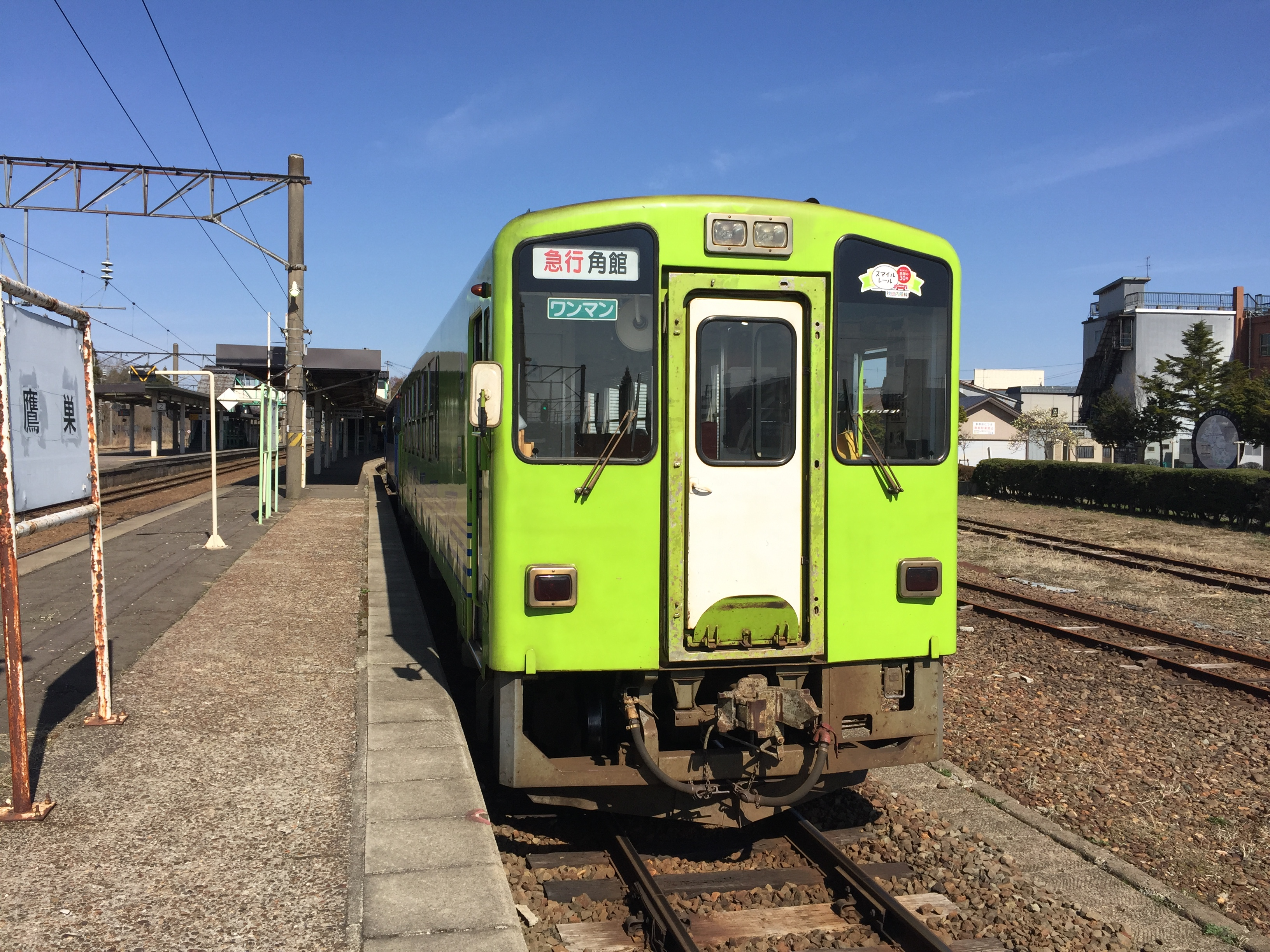 AN8809による急行もりよし 鷹巣駅にて撮影